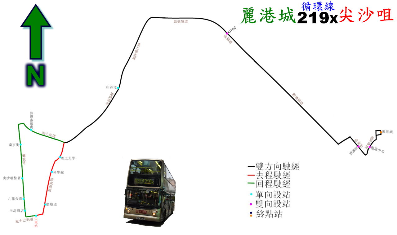 中文（香港）: 九巴219X線的走線圖